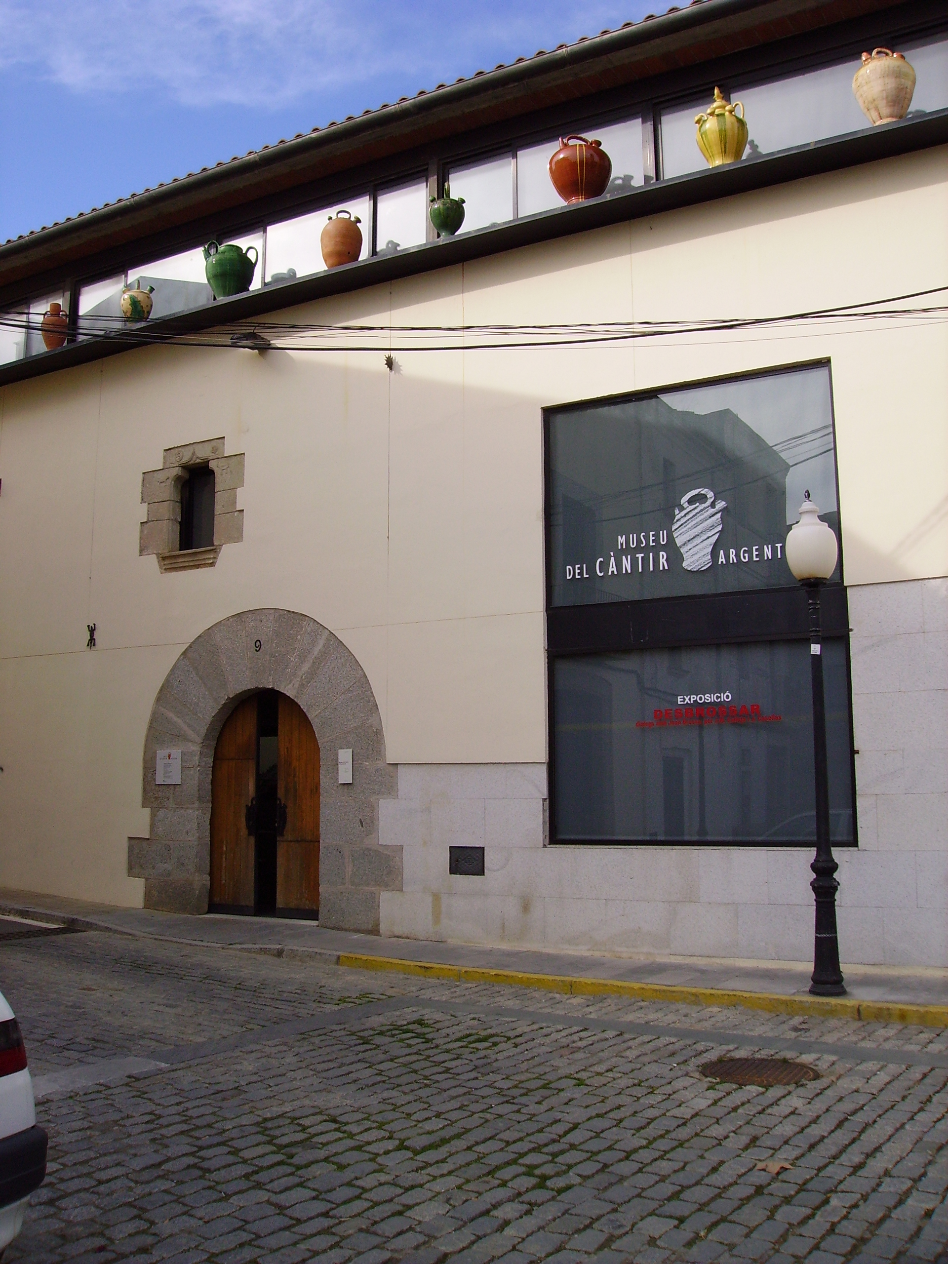 Façana del Museu del Càntir d'Argentona (El Maresme, Catalunya).